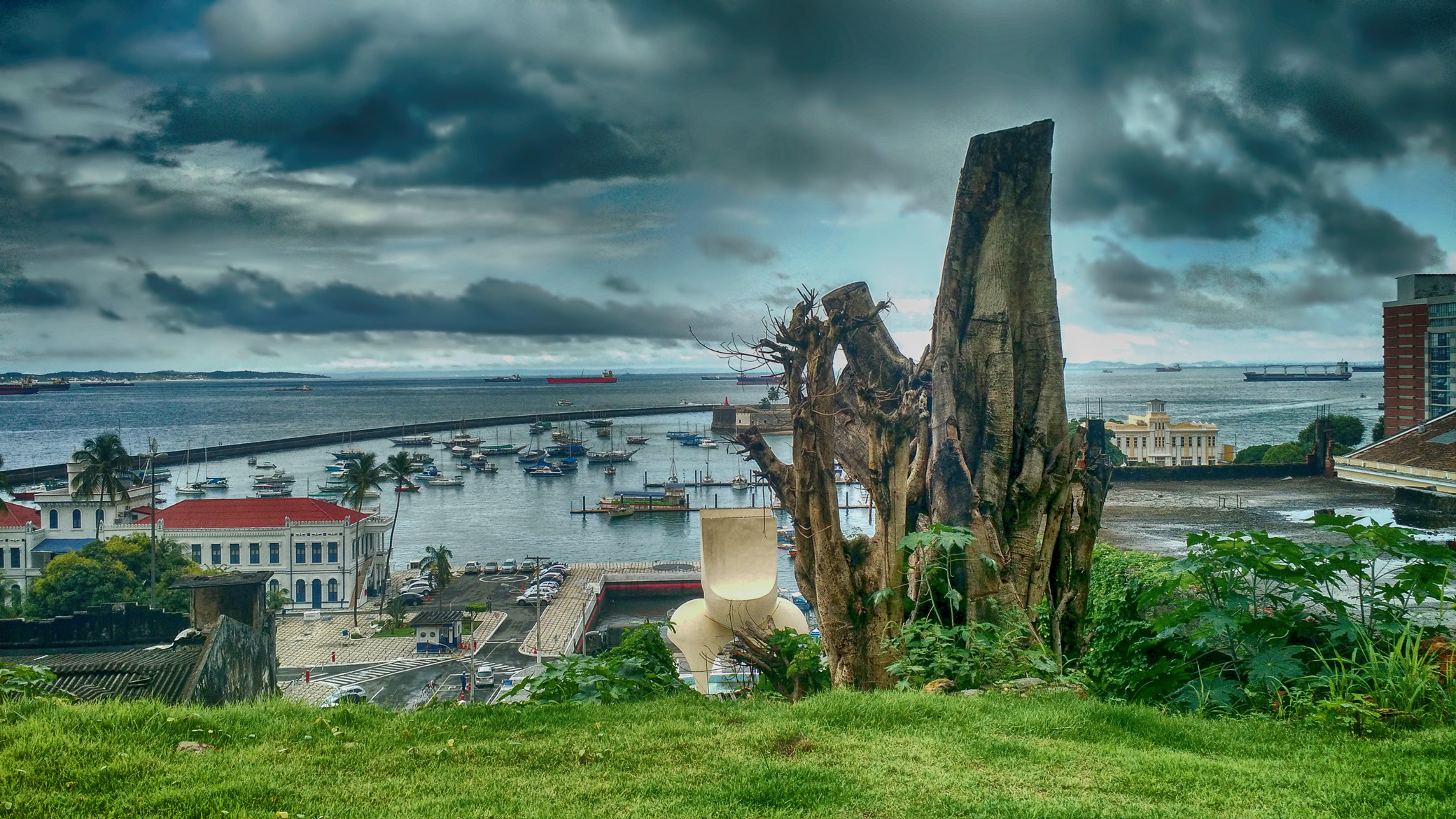 Vista desde a ladeira da montanha para a Cidade Baixa, Salvador, Bahia.